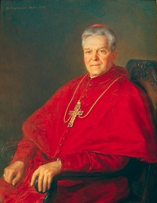 Josef Martin Nathan (1867 – 1947), Český římskokatolický kněz a pomocný biskup.